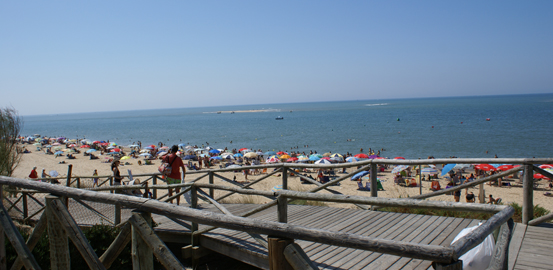 Playa de el Nuevo Portil.